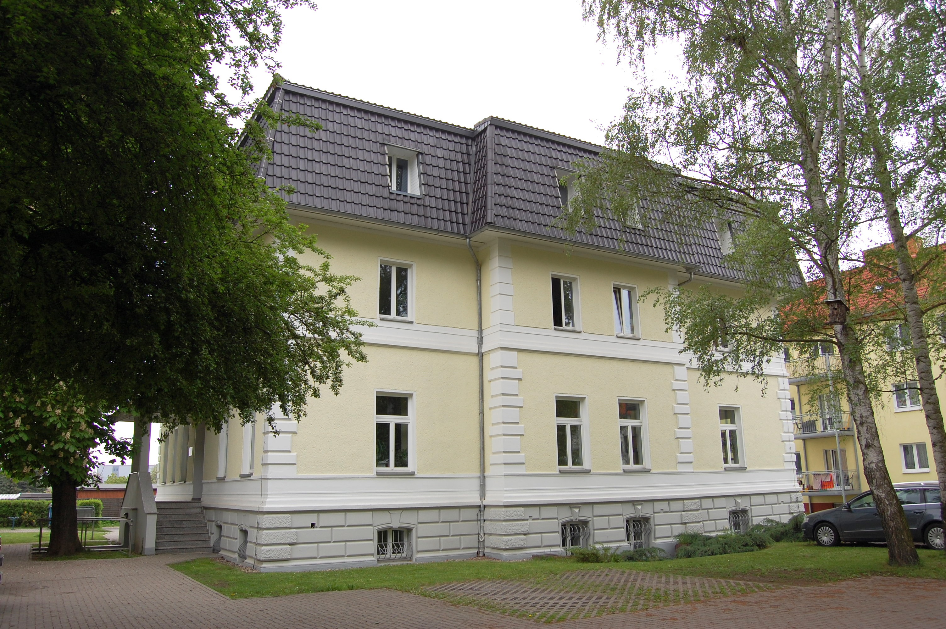 Villa Fiering, Magdeburg Fermersleben